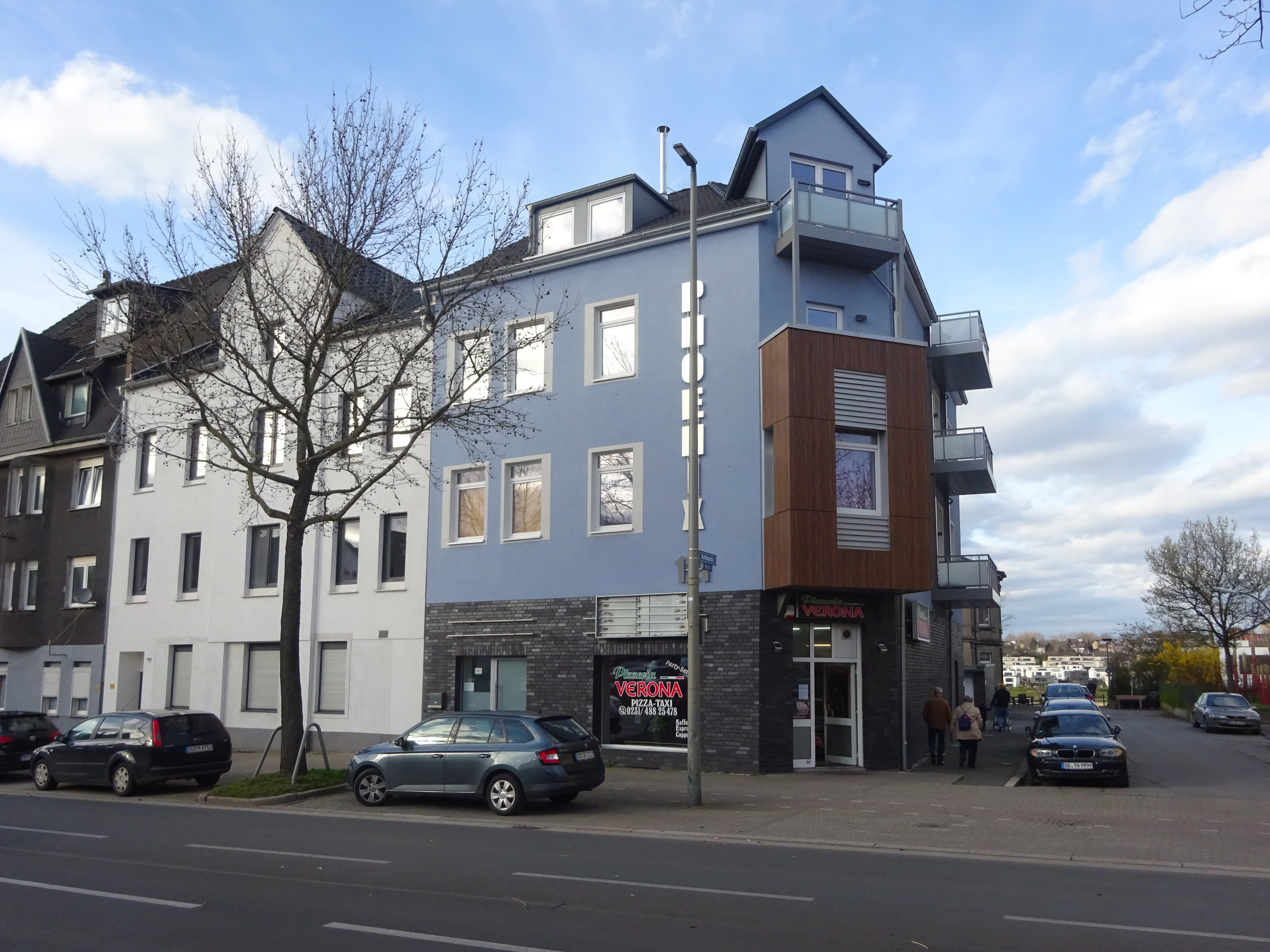 Haus Hermannstr. 121 in Dortmund